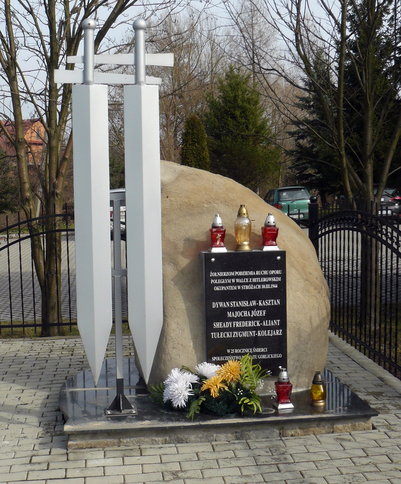 Pomnik partyzantów zastrzelonych przez niemiecką policję kolejową dnia 10 marca 1944r